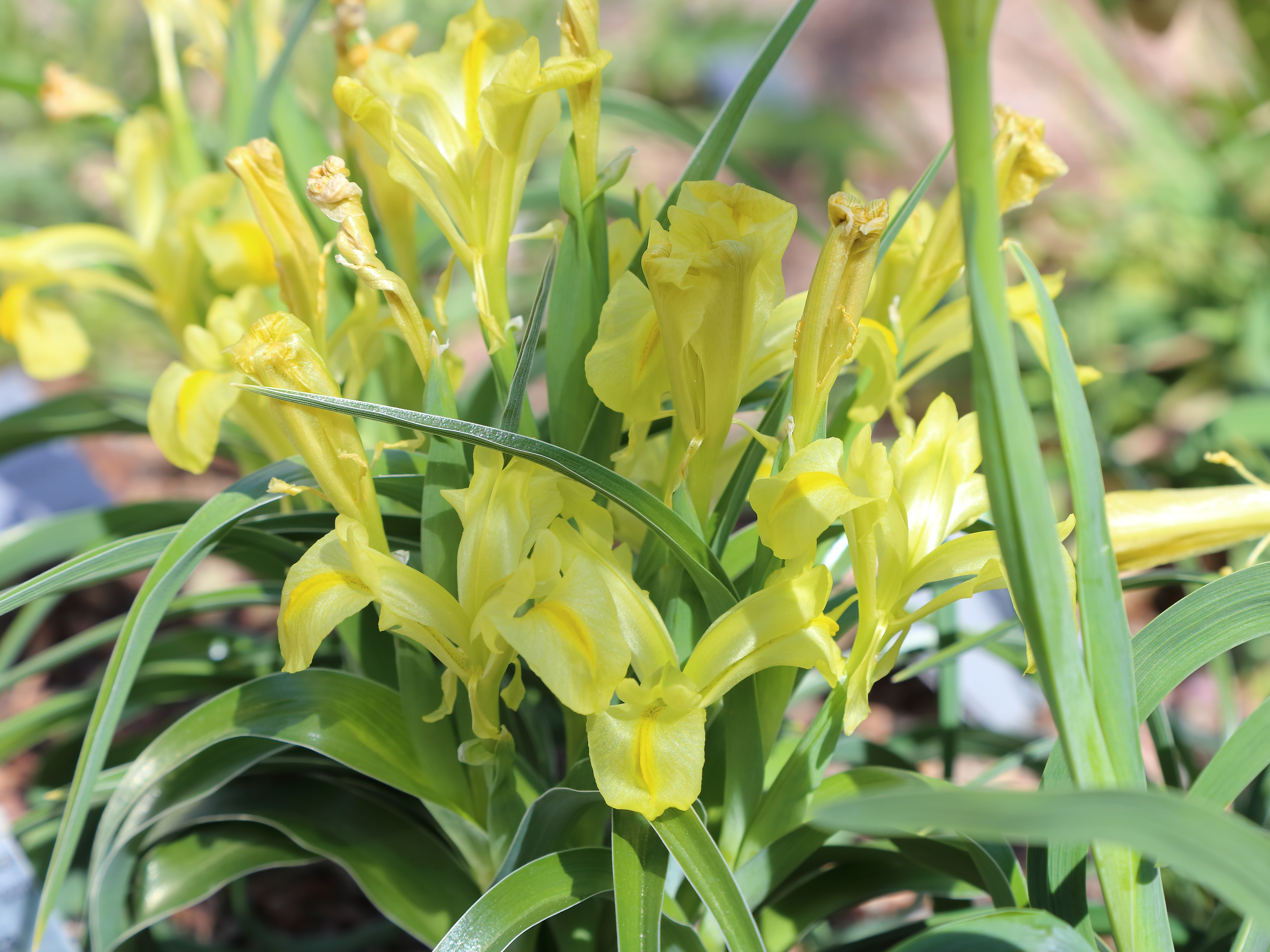 Iris maracandica identifierad med hjälp av skylt i Göteborgs botaniska trädgård.